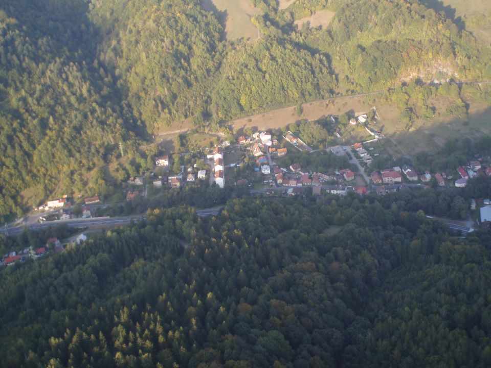 Uľanka